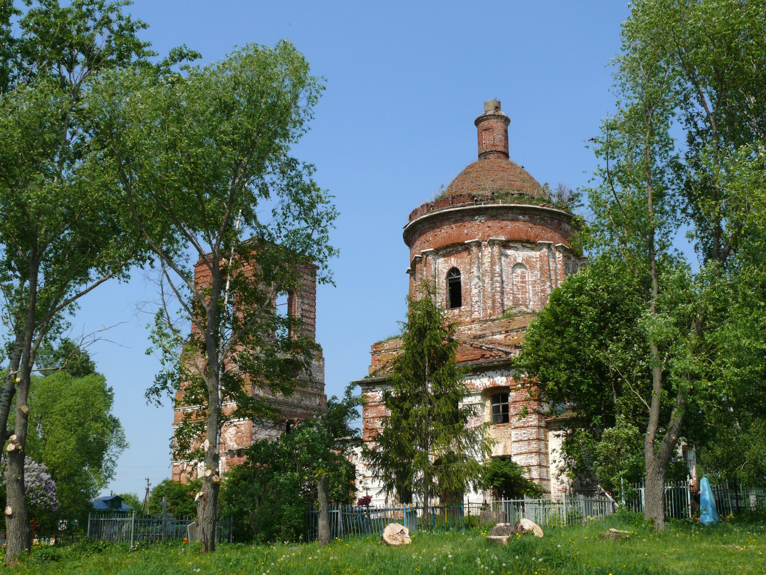 Церковь Воскресения: Новгородское, Суздальский район, Владимирская область